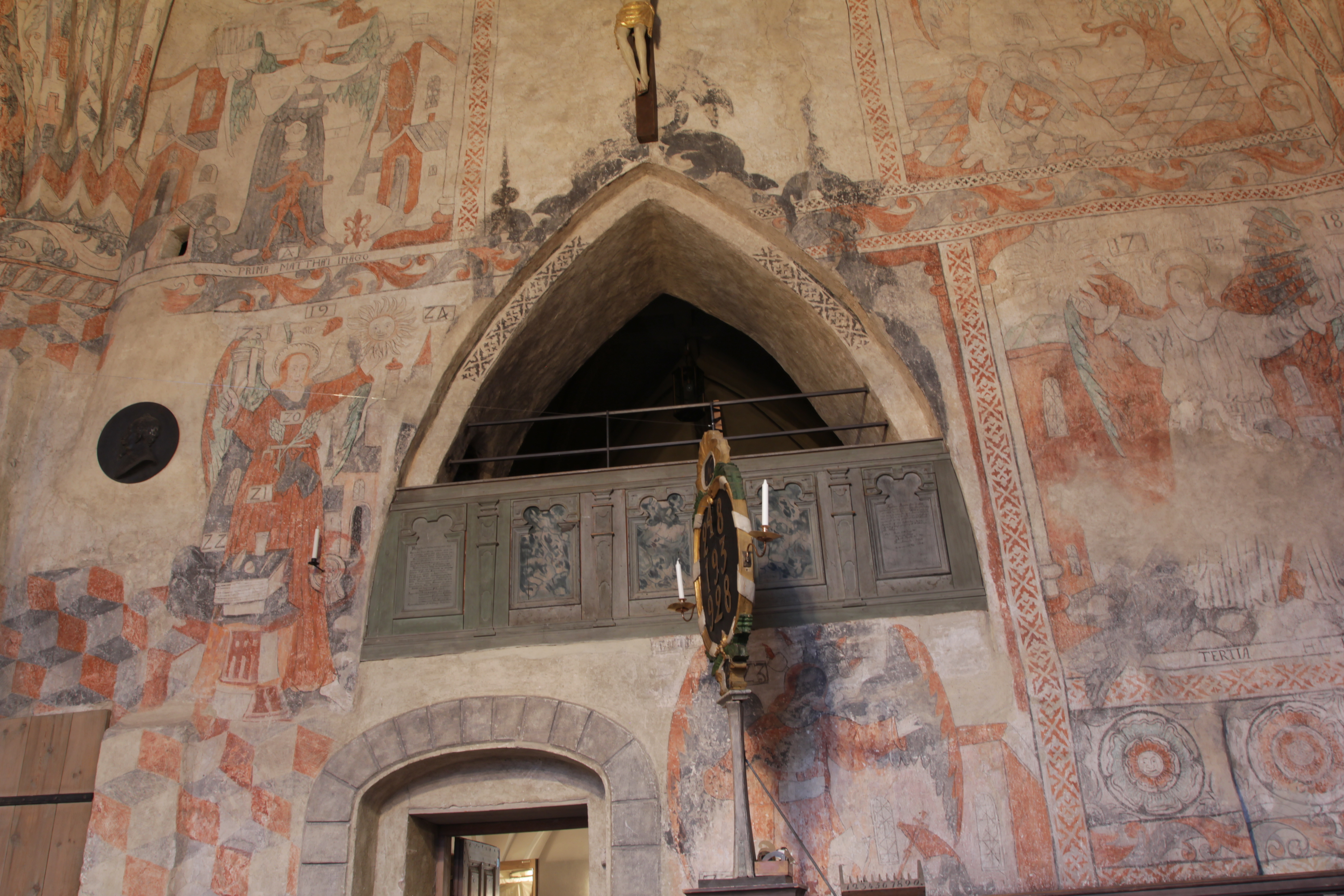 Krucifix och väggmålningar ovanför gapskullen i Vika kyrka